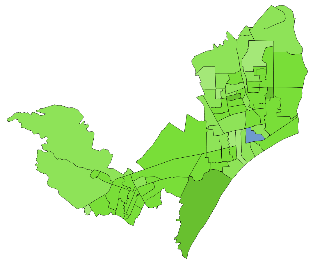 顏色對照表